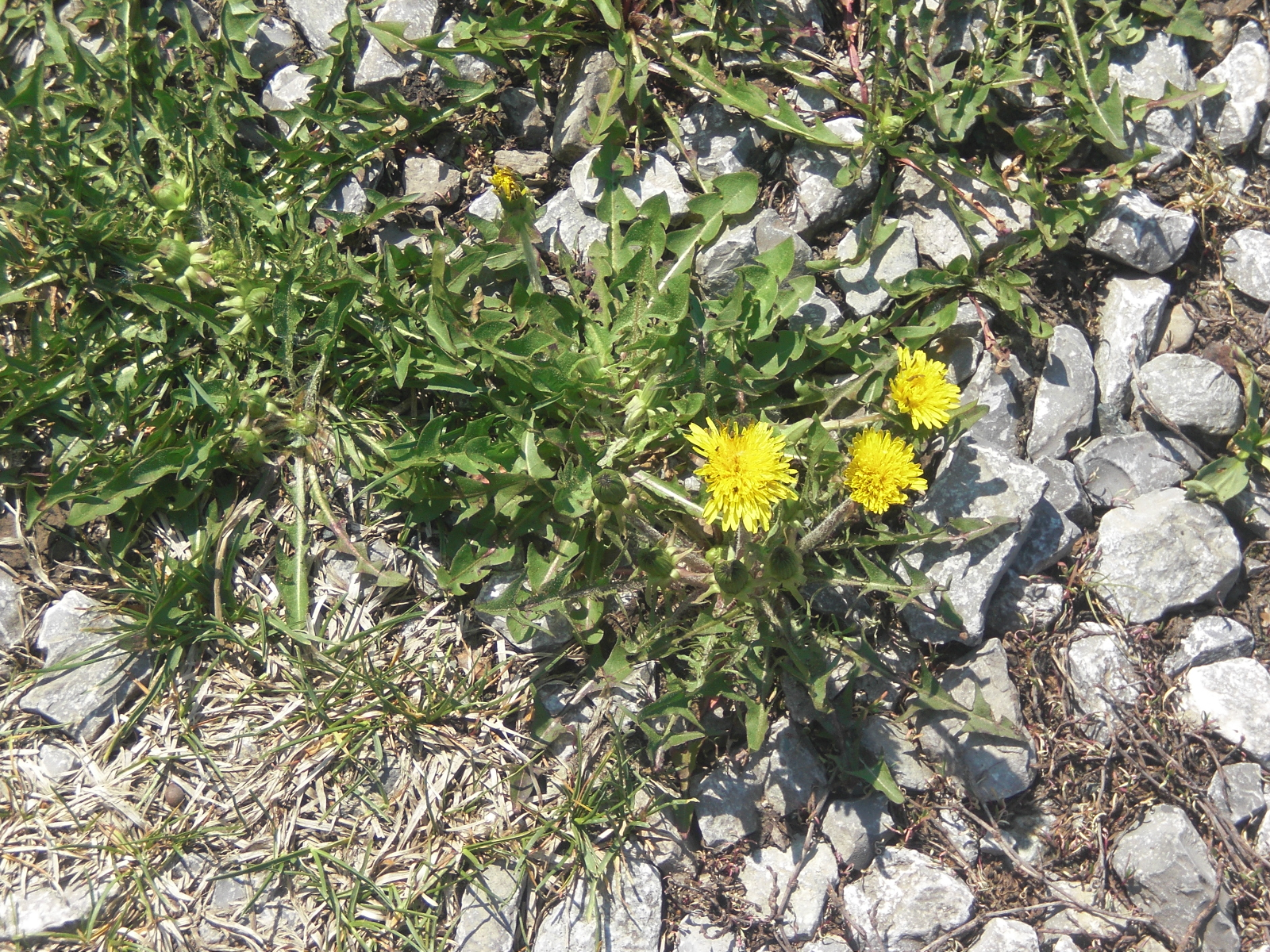 Одуванчик расцвел